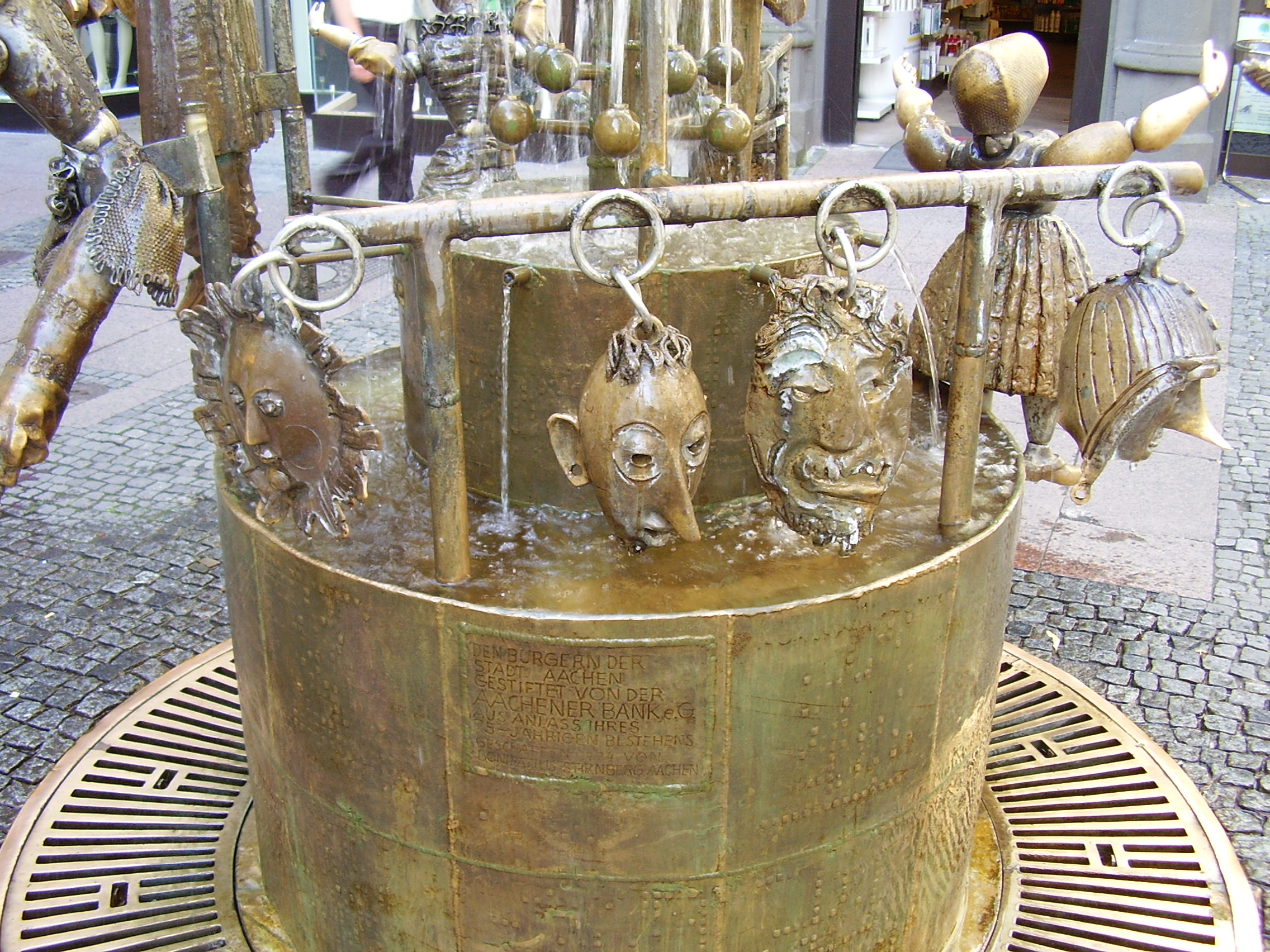 Puppenbrunnen in Aachen